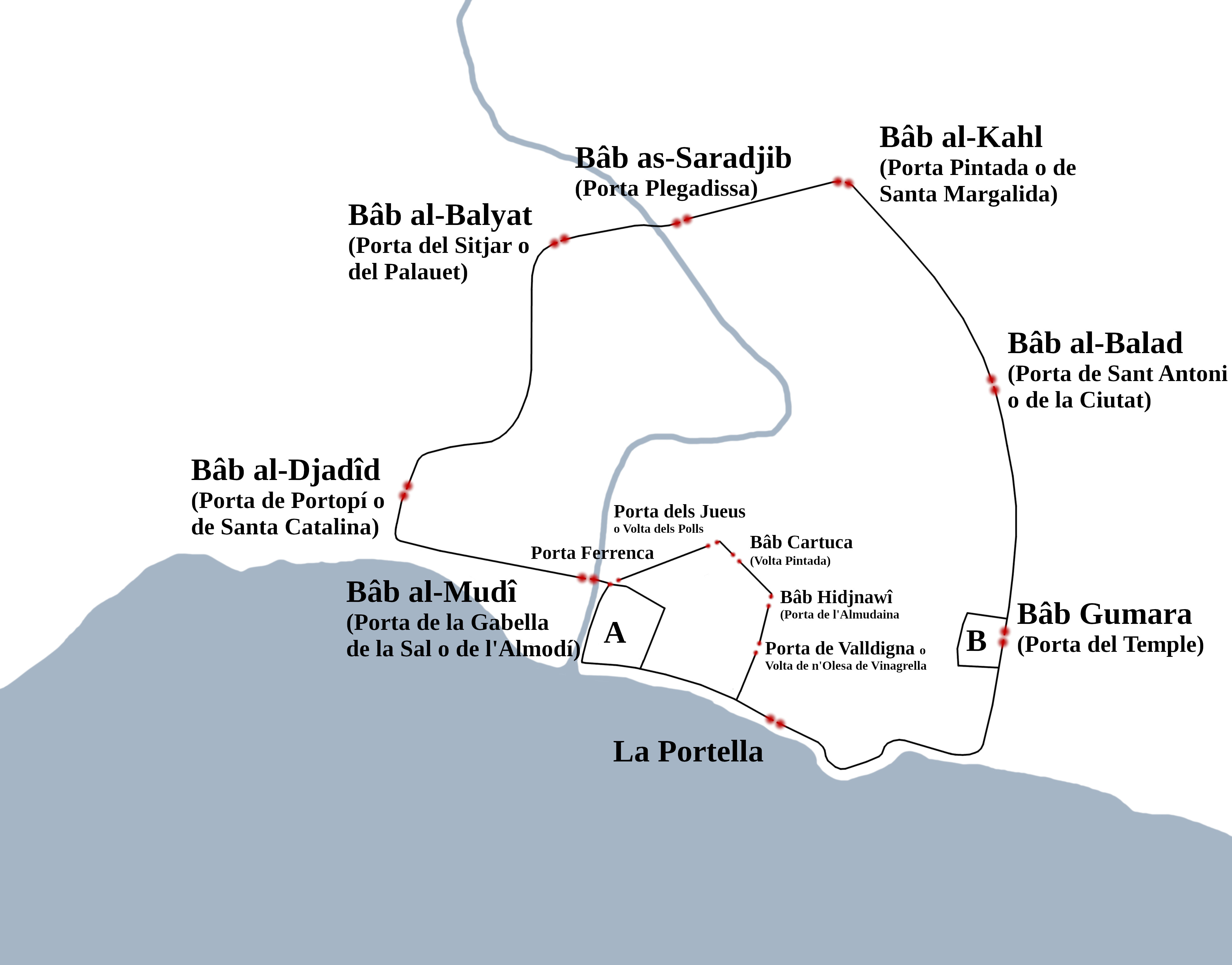 El recinte més gran fou construït durant el regnat de l'emir Mubàixxir Nàssir-ad-Dawla. El segon recinte és d'època califal però encara es conservava, de manera que la ciutat tenia dos recintes muraris; aquest segon s'alçava parcialment sobre l'antiga murada romana. Pel que fa als dos petits recintes fortificats, A correspon al Palau de l'Almudaina i B correspon a l'Almudaina Gumara, més tard coneguda amb el nom del Temple. Extrec la informació de Riera Frau, Magdalena, Evolució urbana i topografia de Madîna Mayûrqa, 1993, pp. 70-89 i de Bibiloni, Gabriel, Els carrers de Palma, 2012, pp. 19-21